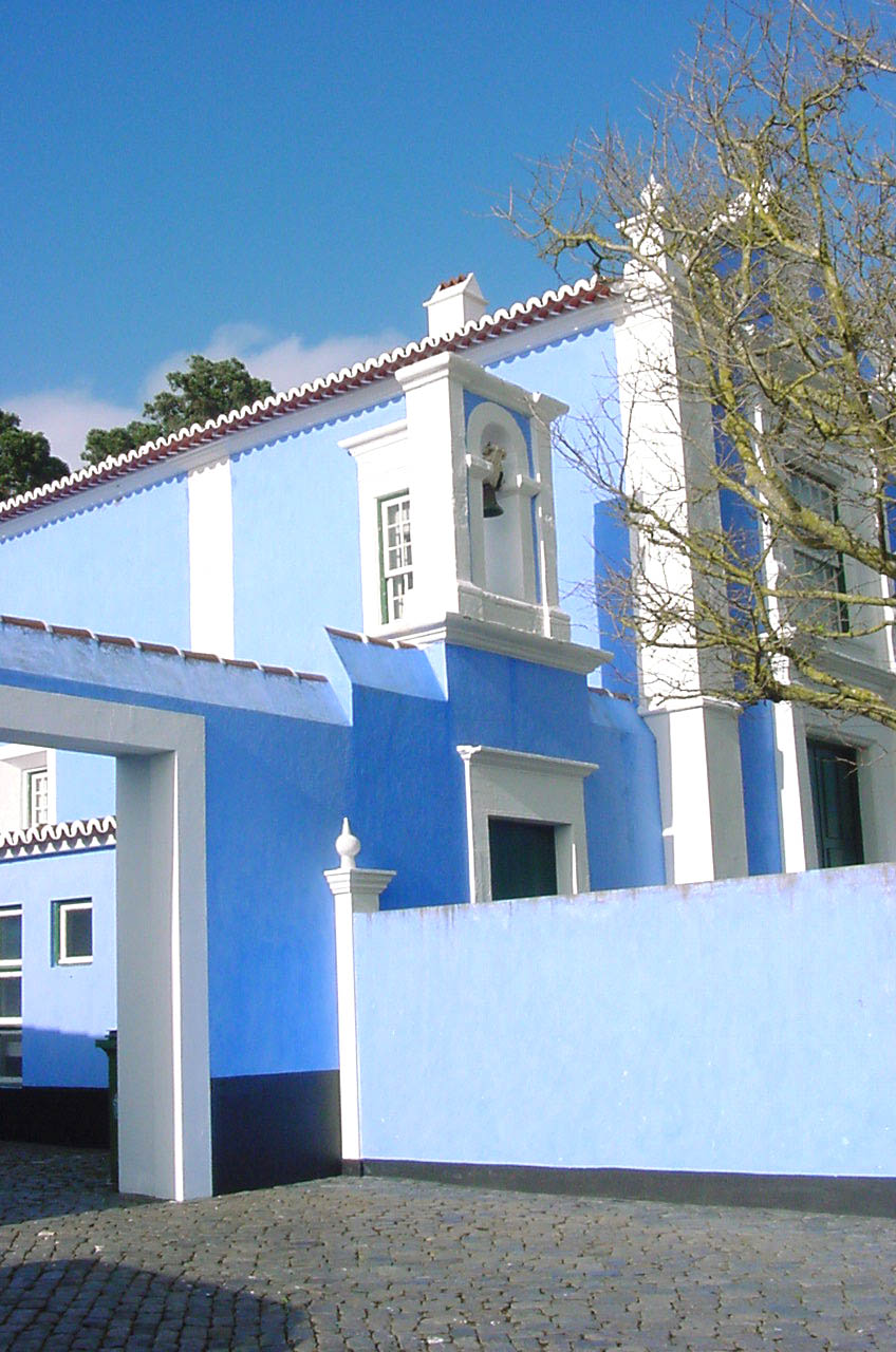 Solar da Madre de Deus, aspecto da capela.